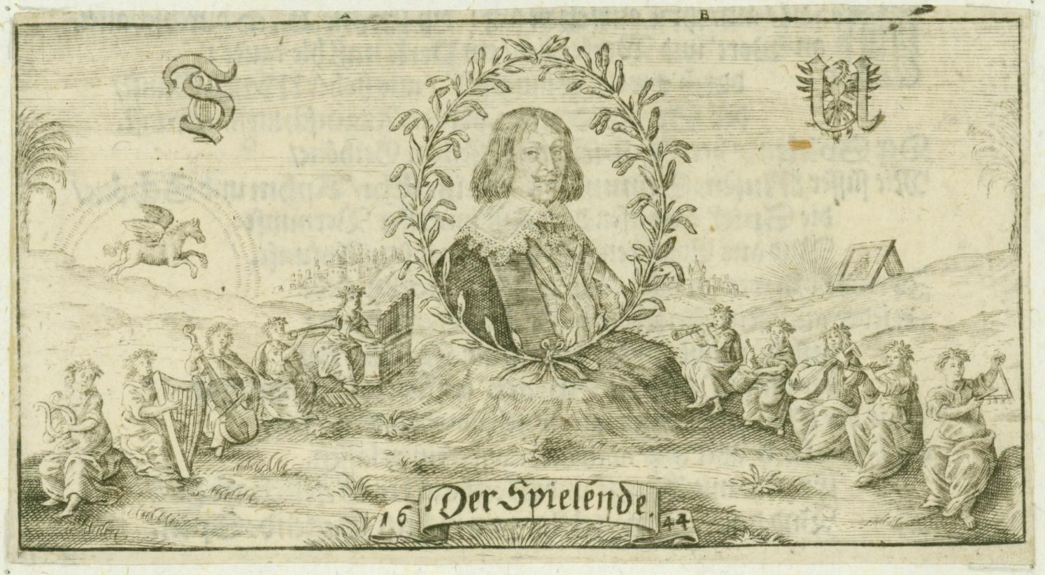 Georg Philipp Harsdörffer "Der Spielende" - sein Migliedsname in der »Fruchtbringenden Gesellschaft« (societas fructifera), Stich, unbekannter Künstler.